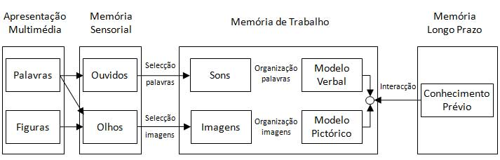 Representação do funcionamento da memória humana